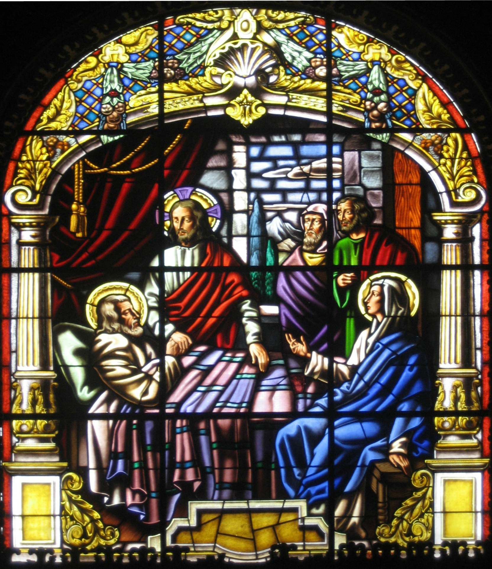 Cuba, Parroquia de San José de Jatibonico: 9-Vitral de la Muerte de San José